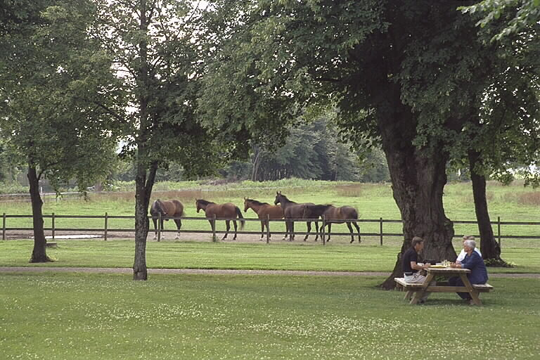 Hästhage. Motiv: Strömsholms slott Nyckelord: Byggnadsminnen:Statl, Riksintressen Kategori: SlottHästhage.